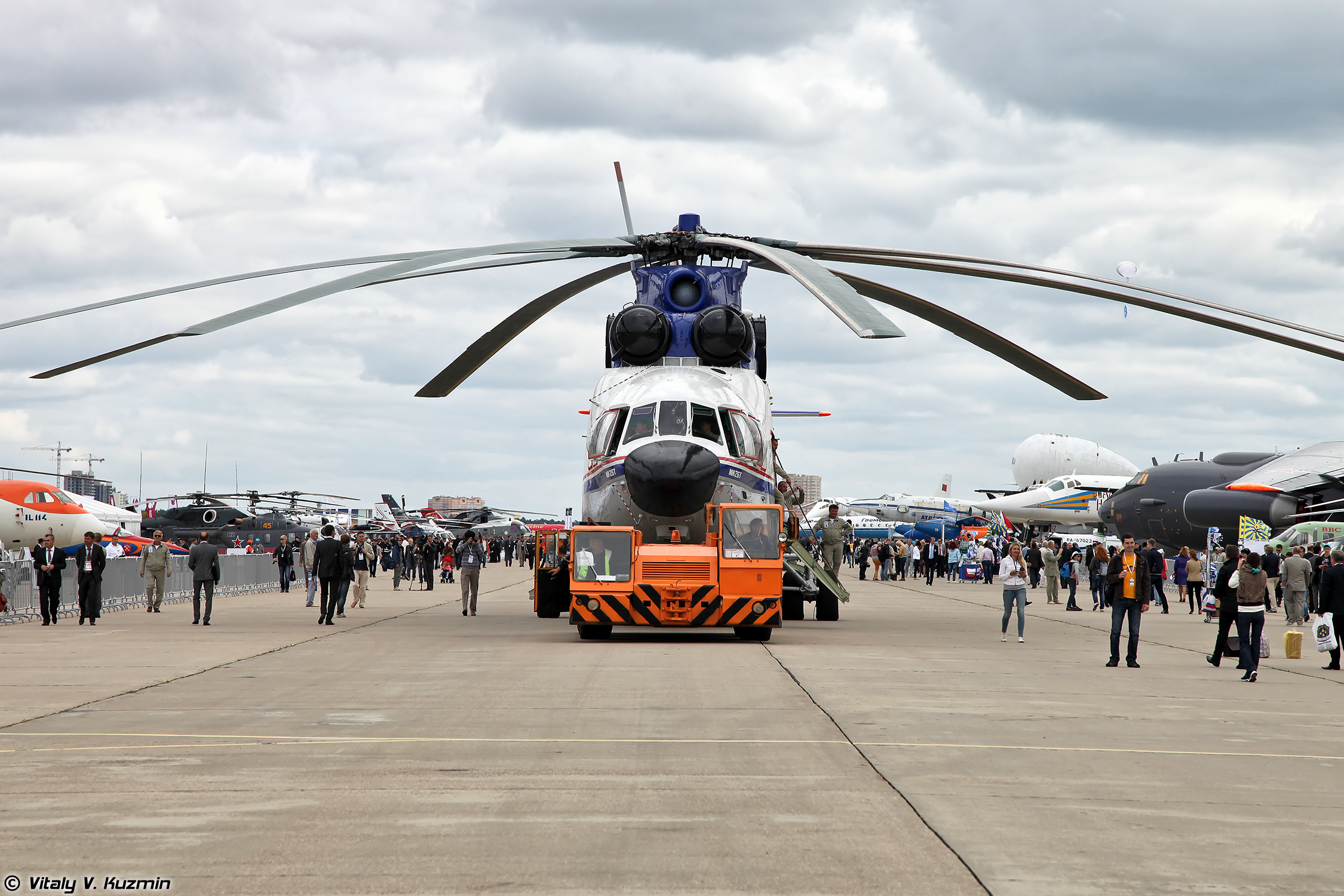 Ми-26Т (Mi-26T)